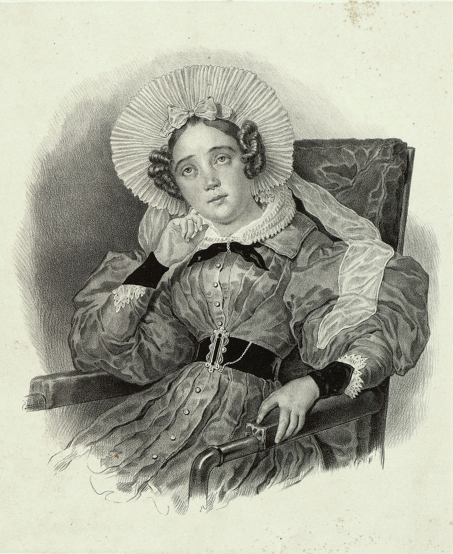 Елизавета Михайловна Сперанская, в замужестве Фролова-Багреева (1799—1857)